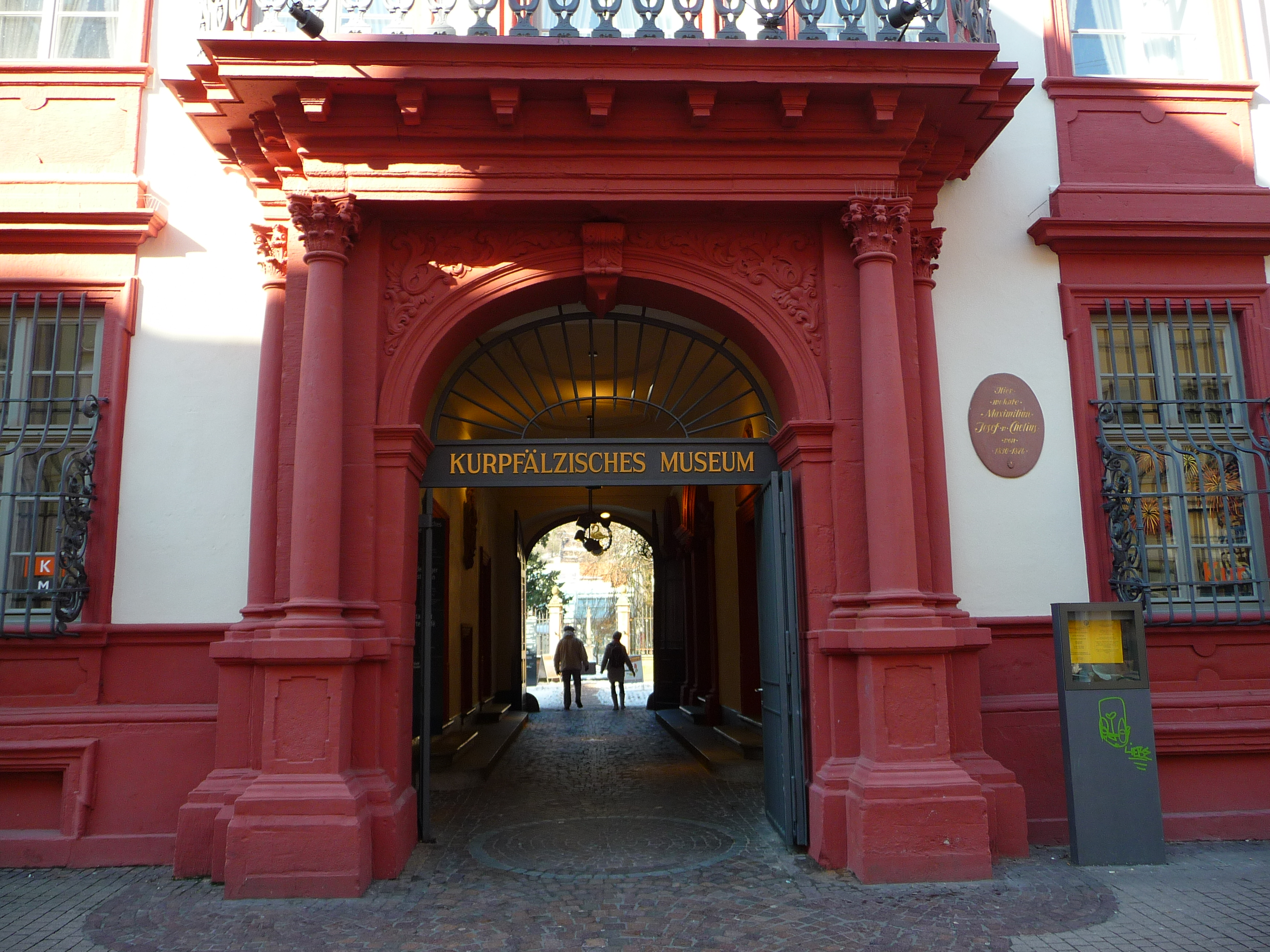 Haupteingang des Kurpfälzischen Museums in der Fußgängerzone der Heidelberger Altstadt (Baden-Württemberg, Deutschland)